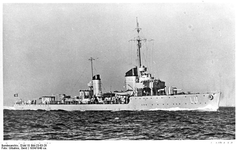 Torpedoboot "Luchs" Torpedoboot "Luchs" [Torpedoboote Typ 24, "Raubtier-Klasse".- "Luchs" (LU) auf See. Ansicht der Steuerbordseite]